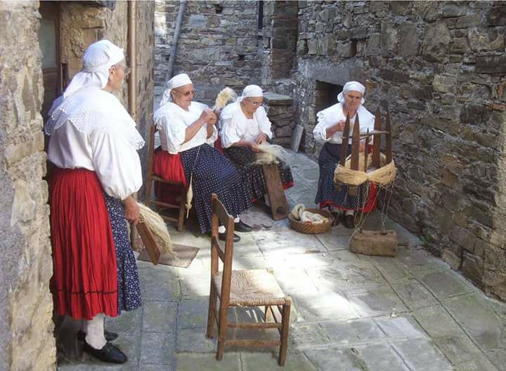 Sanpaolesi in Arbëreshë-Tracht